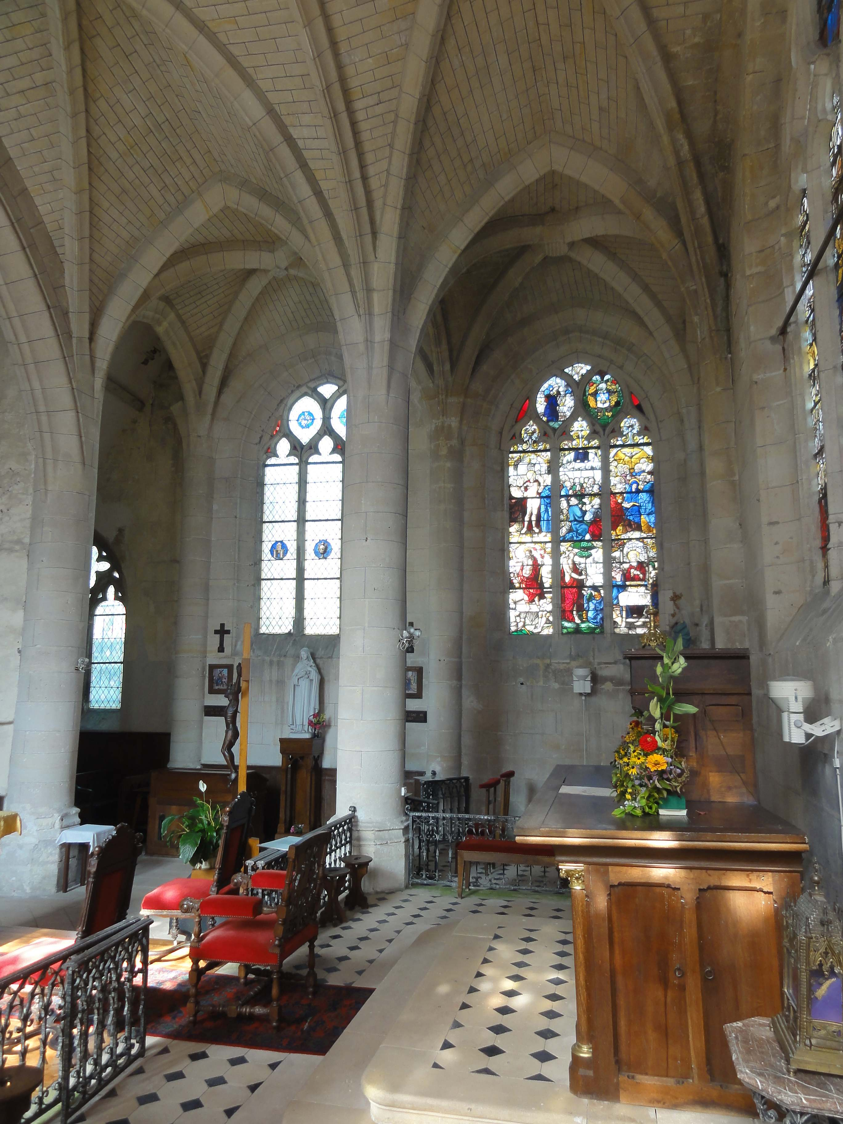 Intérieur de l'église - voir titre.